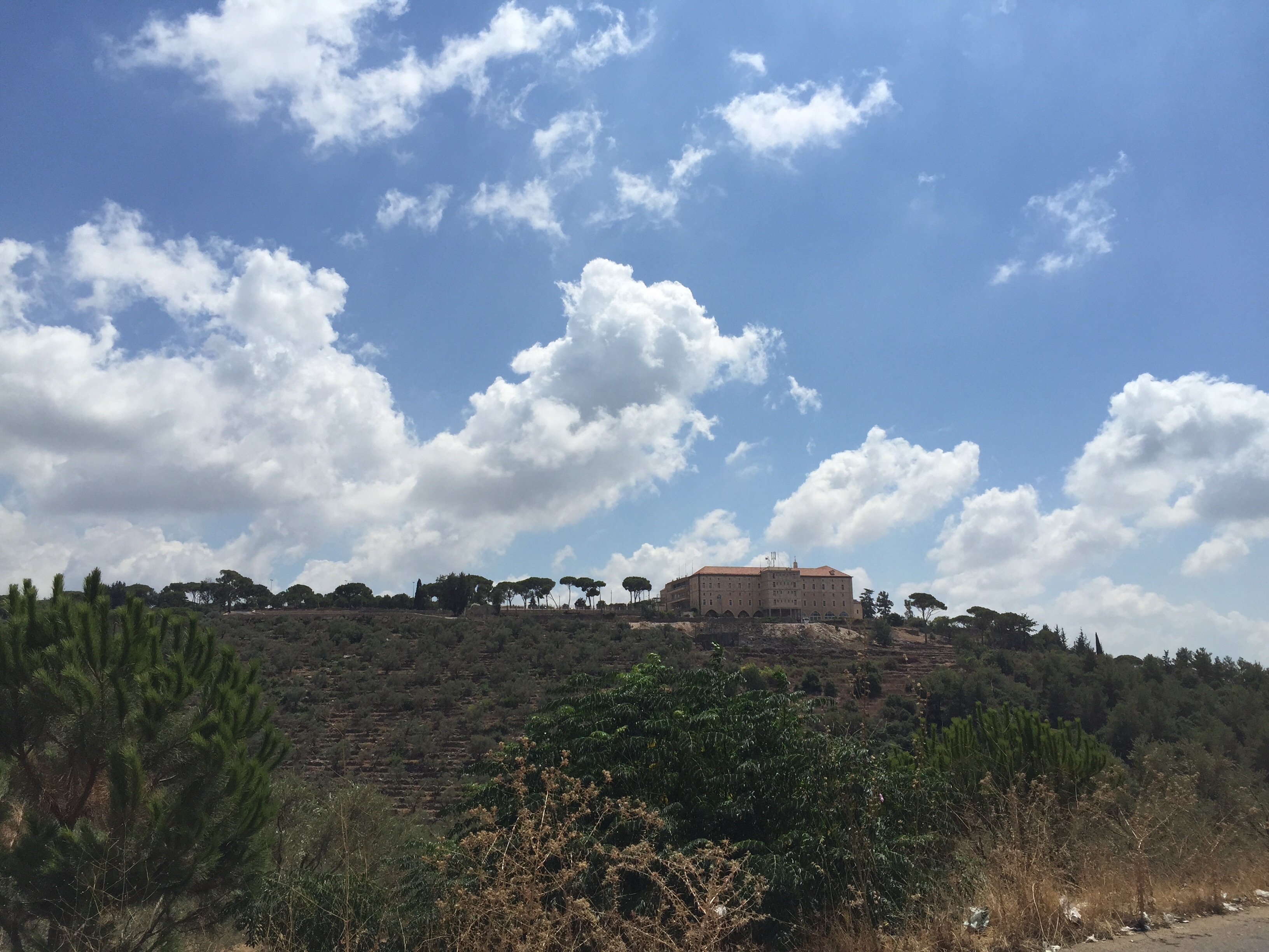 Joun, Lebanon